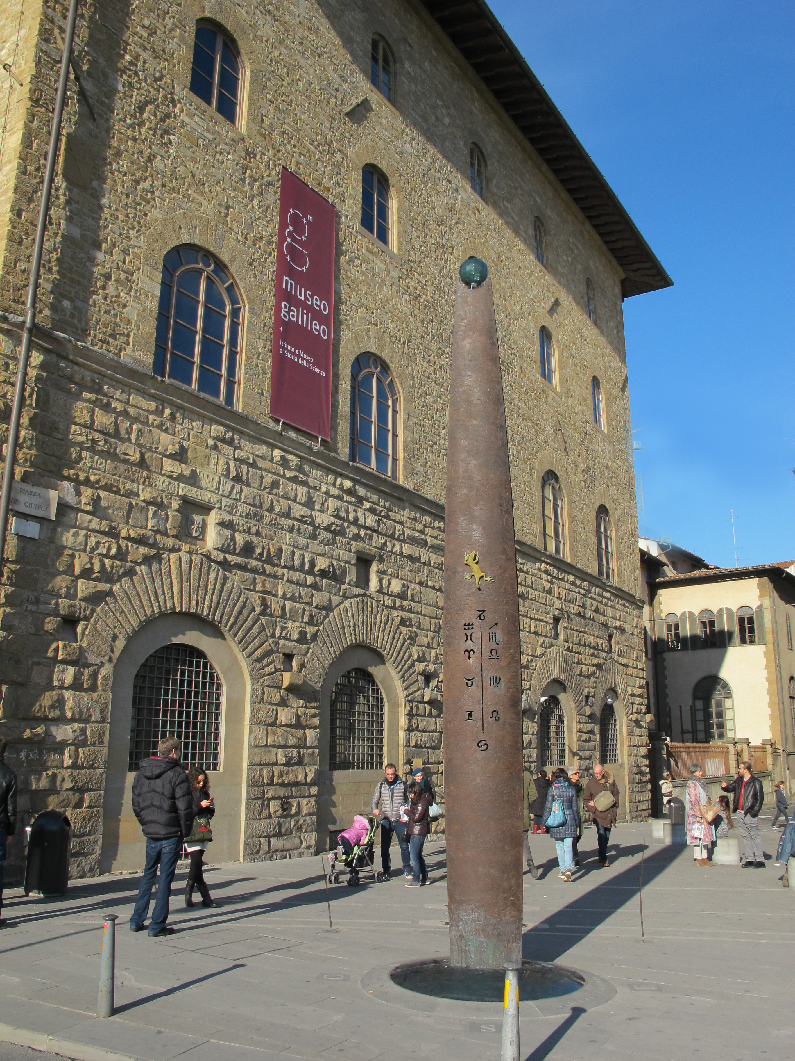 Museo Galileo, Firenze